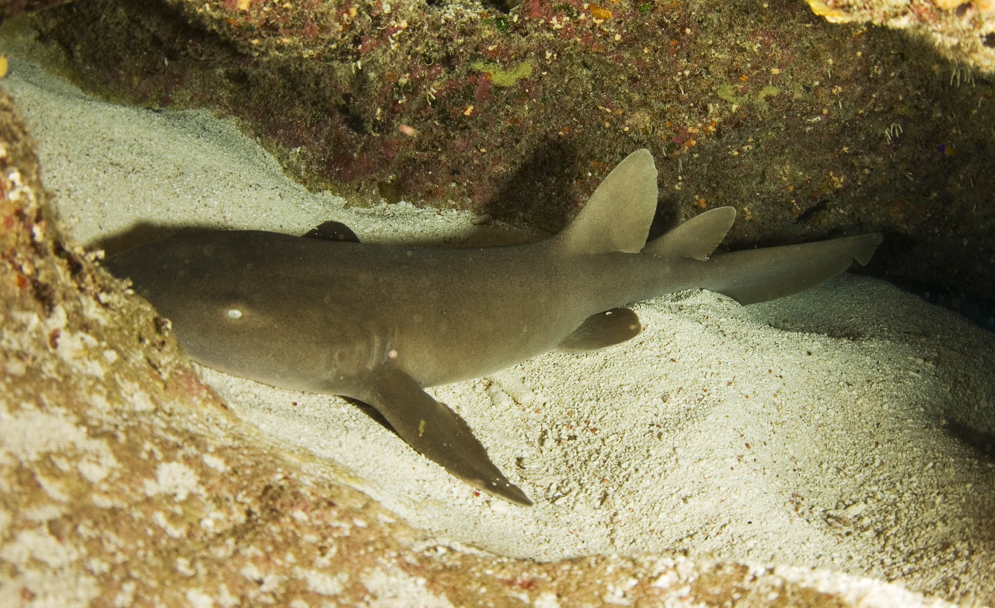 verpleegsterhaai